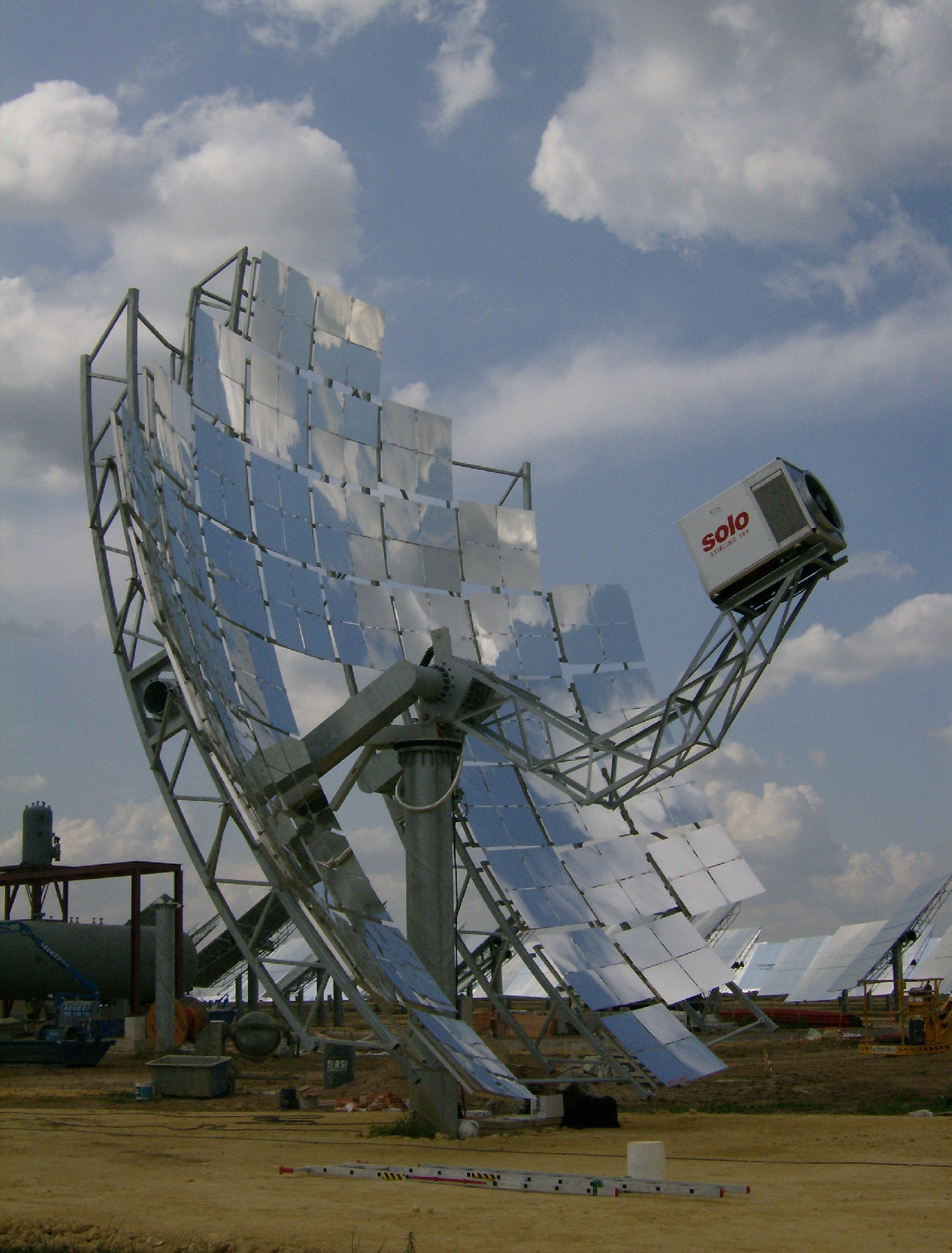 Instalación de discos parabólicos con motor Stirling en la Plataforma Solar de Sanlúcar la Mayor. Esta es una actividad referente a la ionvestigacion y desarrollo en la plataforma solar.